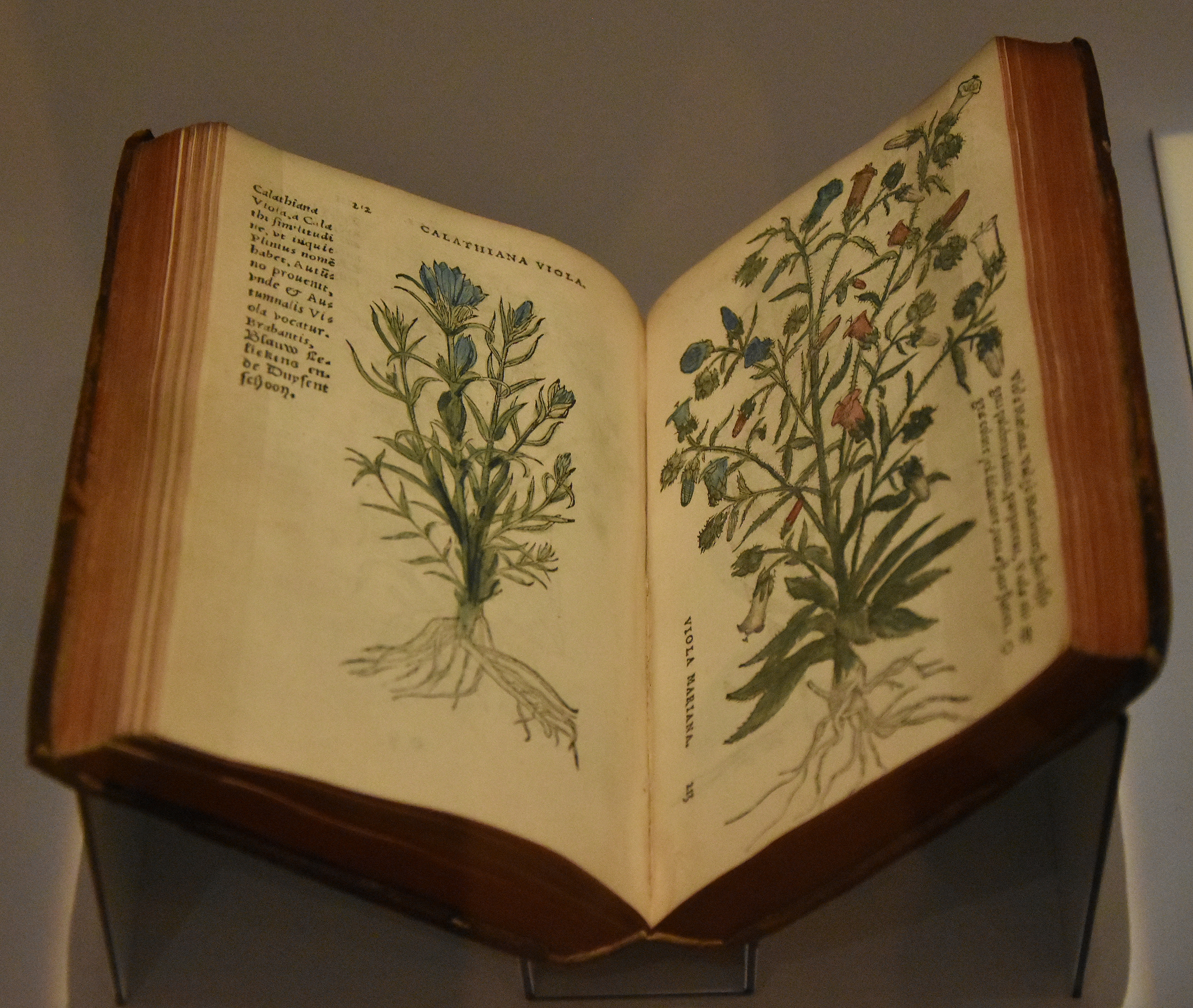 Rembert Dodoens (1517-1585) - Cruydeboeck (1554) Museum Hof van Busleyden Mechelen This photo of movable heritage has been taken in the Flemish Region